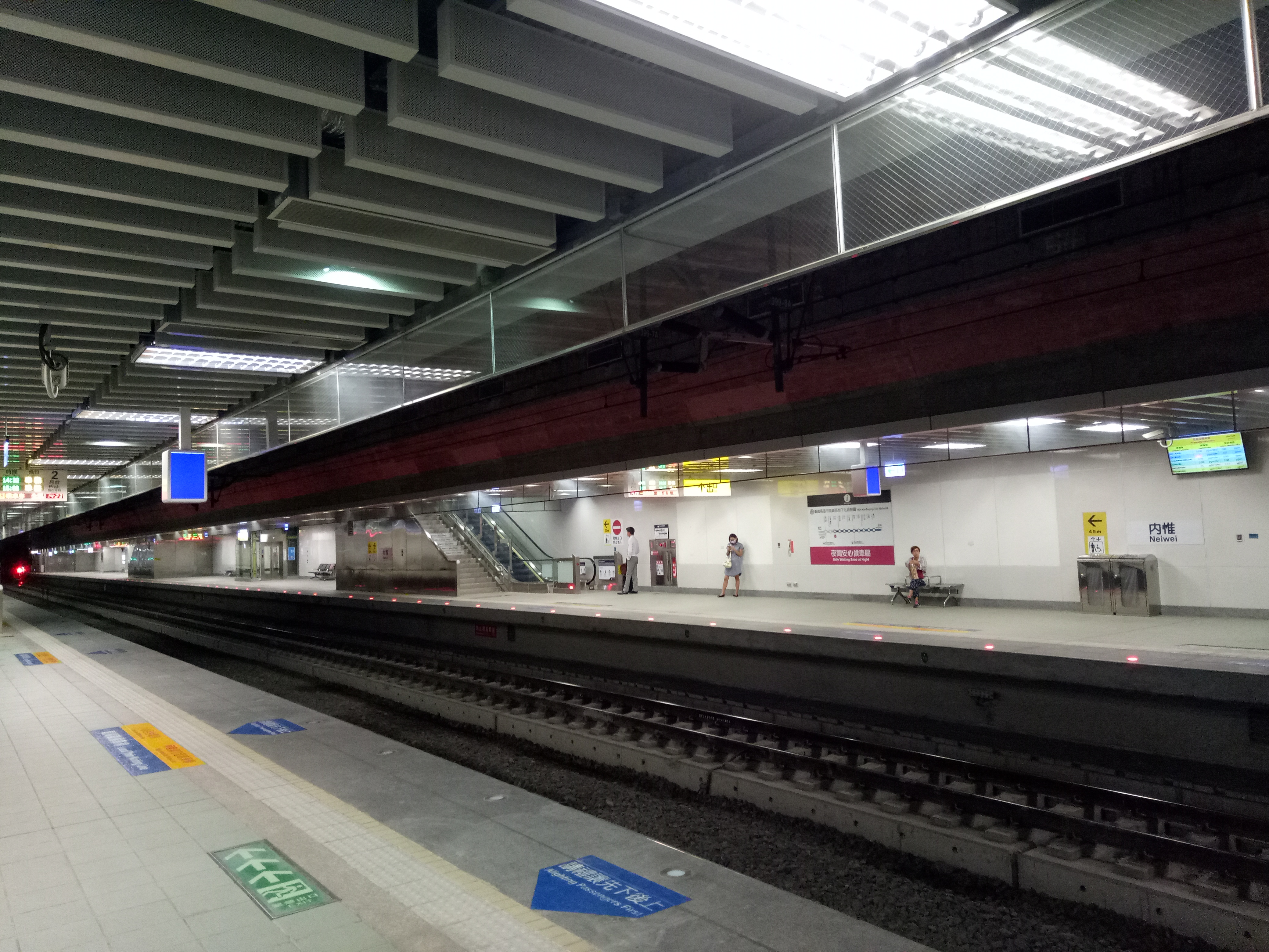 臺鐵內惟車站，地下月台。